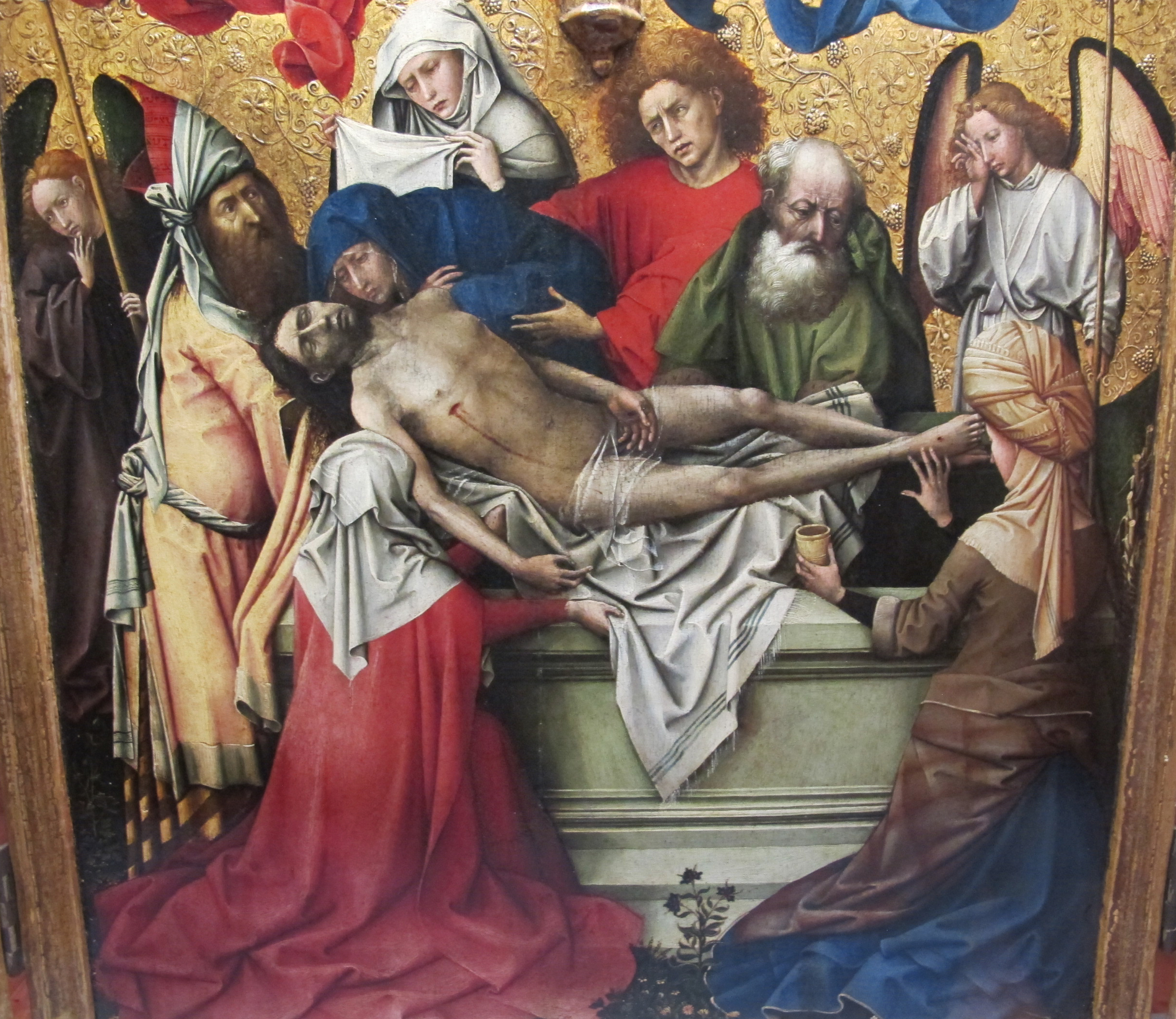 Robert campin (attr.), trittico seilern, 1425 ca.